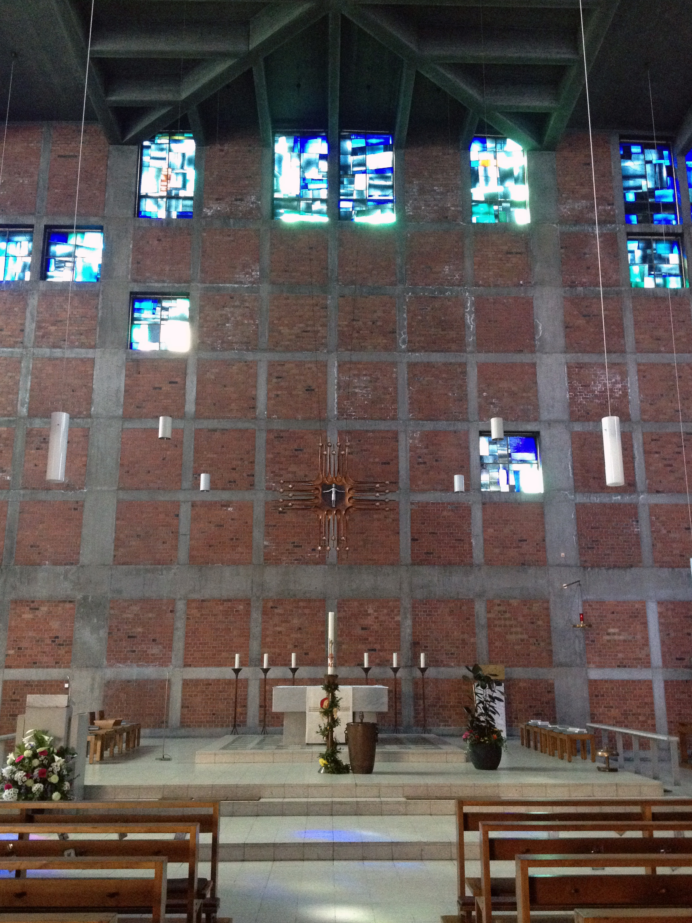 St. Antonius, Innenansicht, Chorraum in der Osterzeit